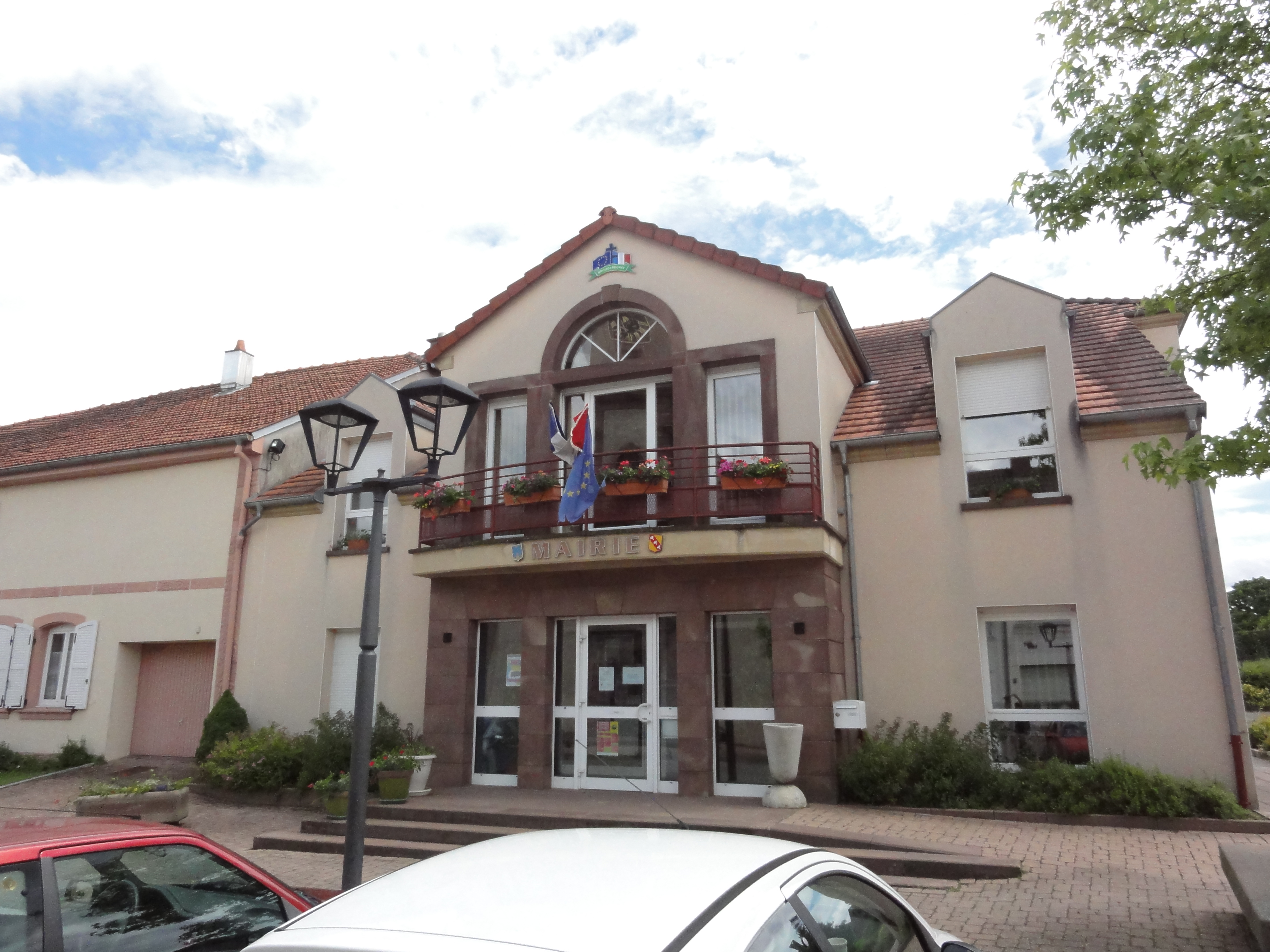 Brouderdorff (Moselle) mairie